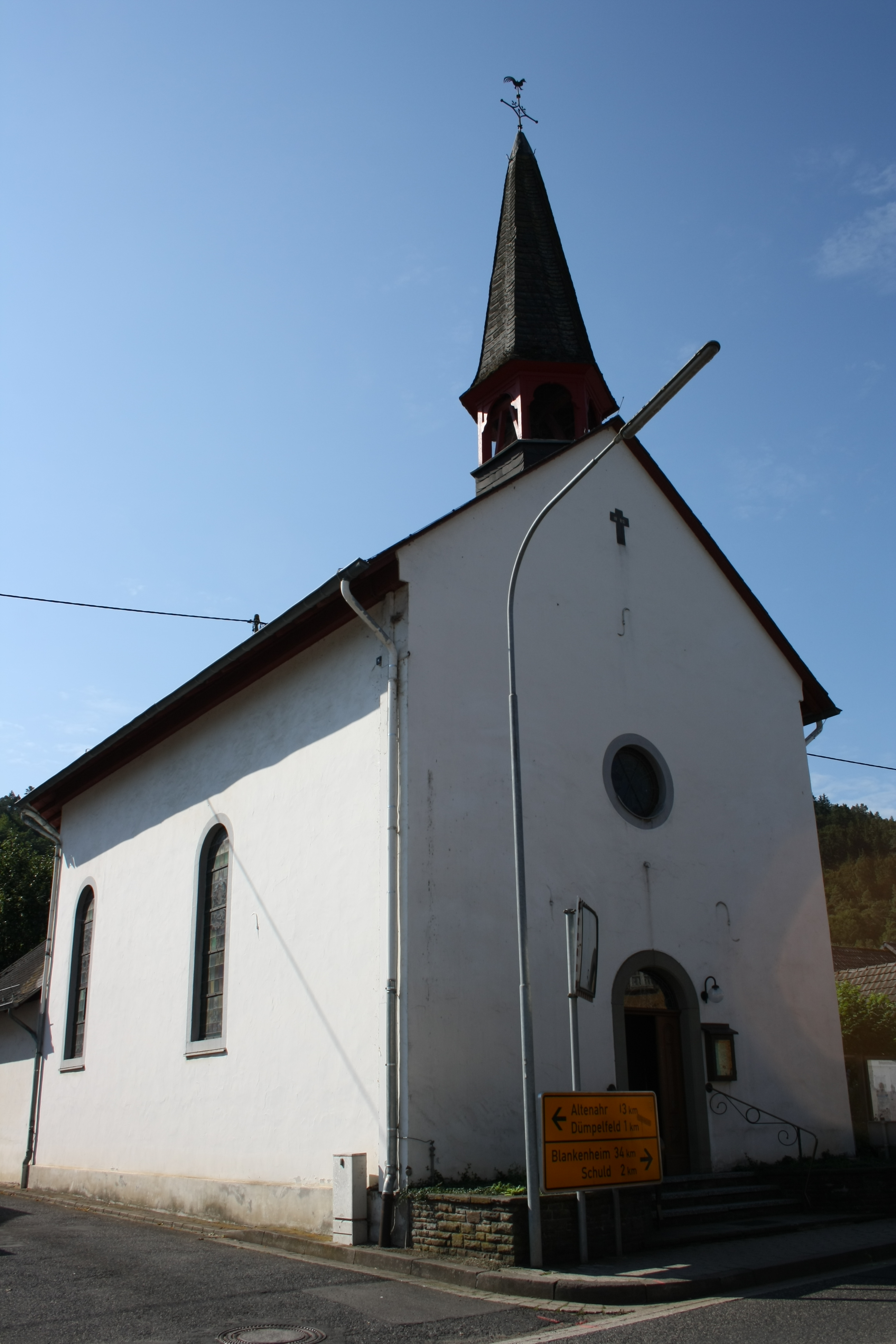 Außenaufnahme der Filialkirche St. Rochus und Sebastian in Insul